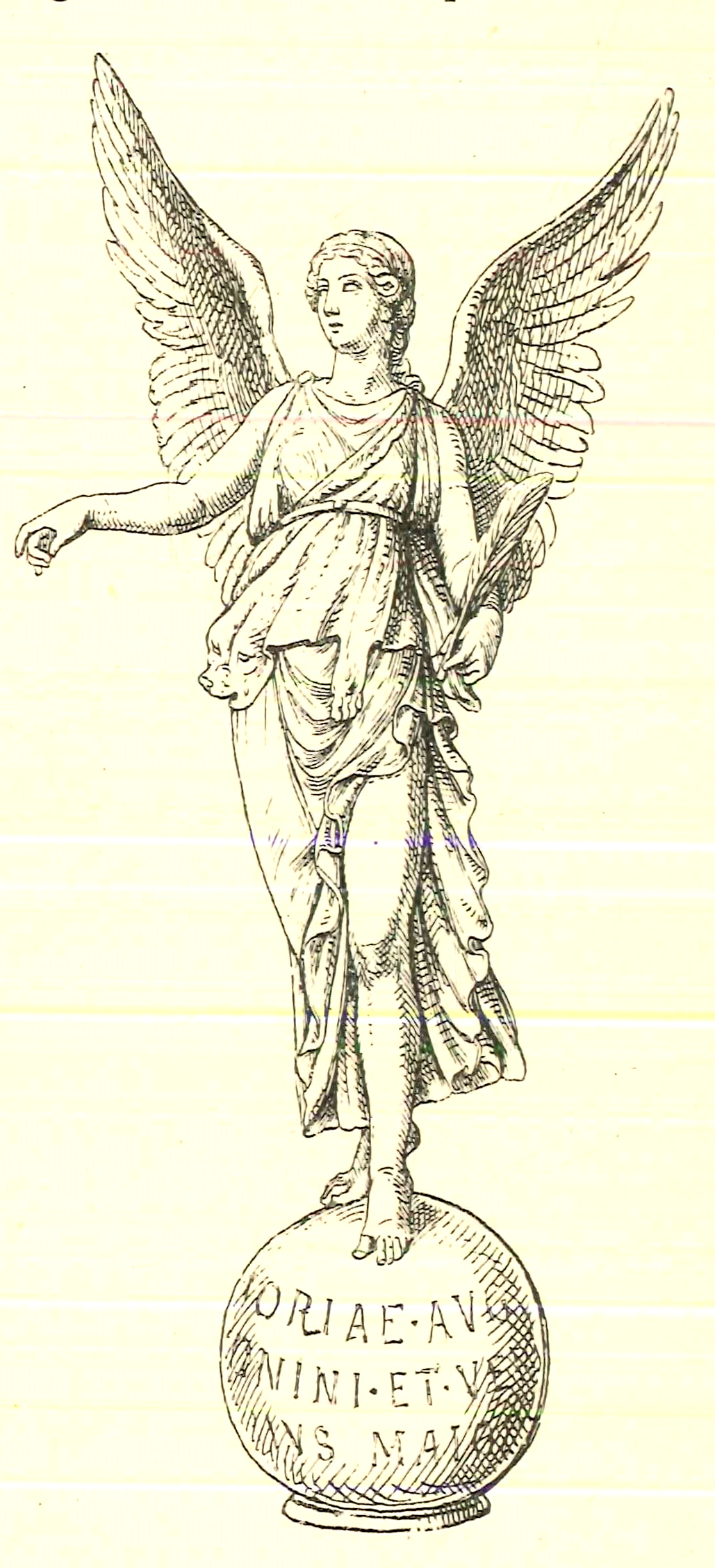 Zeichnung der Victoria von Calvatone von 1891 (damals in den Königlichen Museen zu Berlin, heute in der Eremitage in Sankt Petersburg)